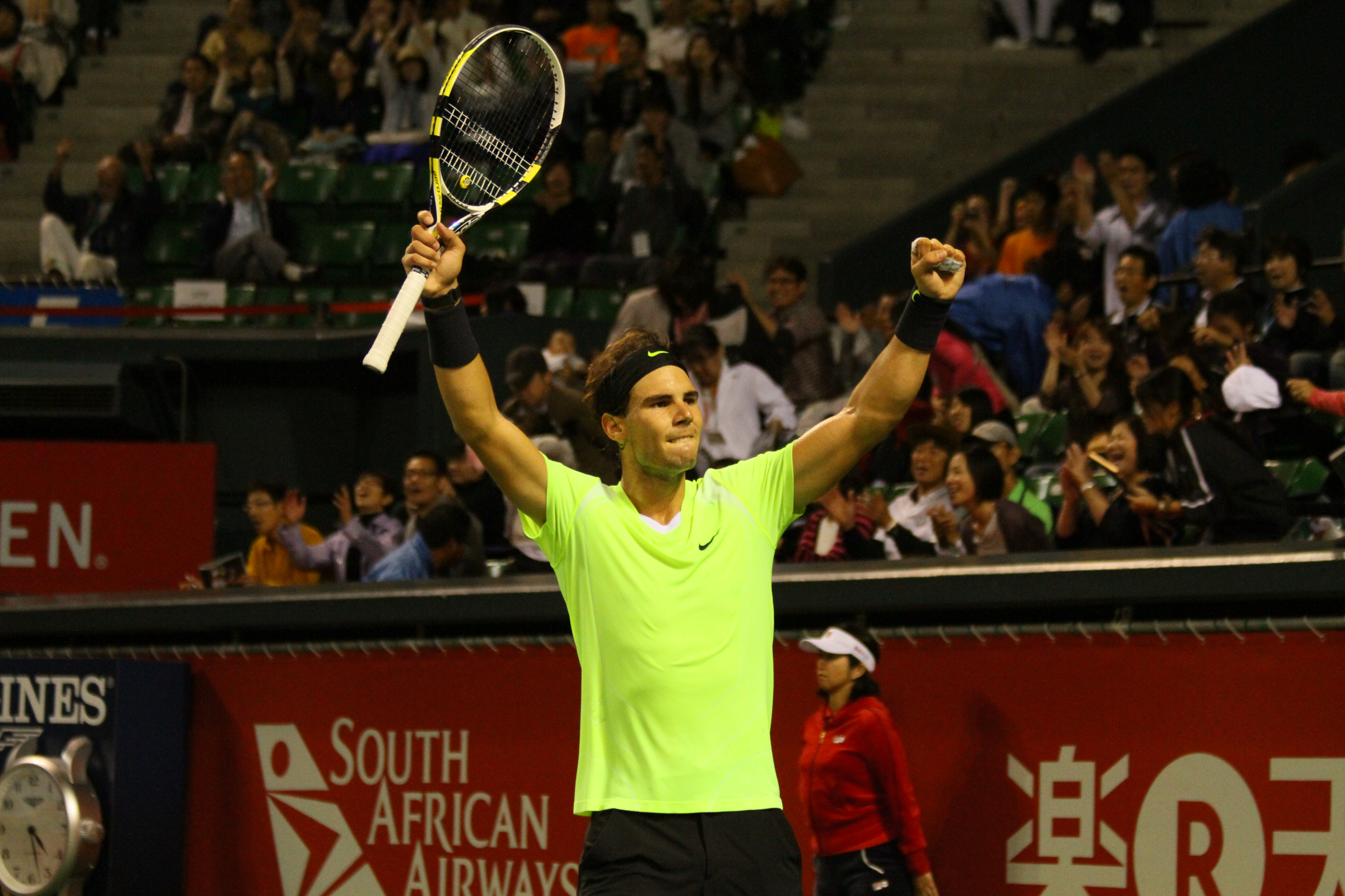 Rafael Nadal, en el torneo ATP de Tokio 2010.